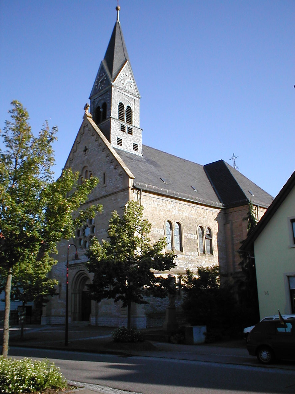 Neue Kirche von 1904 in Obergimpern (Bad Rappenau).